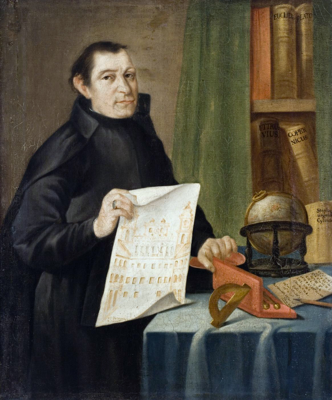 Беларуская (тарашкевіца): Партрэт Тамаша Жаброўскага (Tamaš Žabroŭski), астранома і архітэктара Вялікага Княства Літоўскага